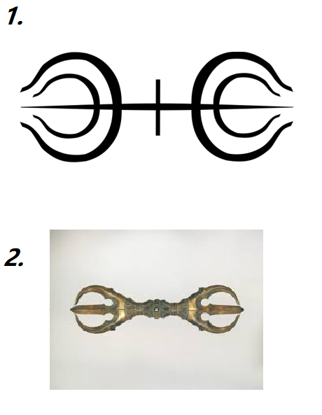 Modifikácia dvoch obrázkov z wiki commons. Zobrazujú dva symboly - klan Sendžu a vadžra. Pridané za účelom popísania súvislosti medzi dvomi symbolmi.